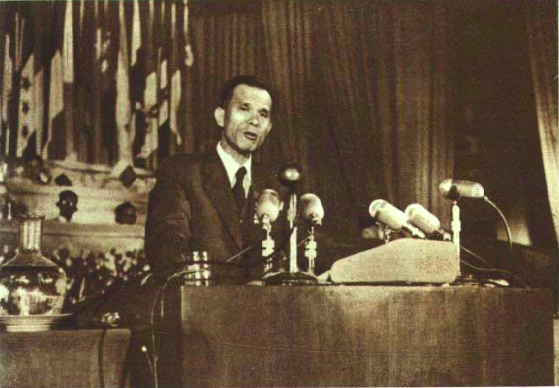 1952年10月2日亚洲太平洋区域和平会议日本代表龜田東伍